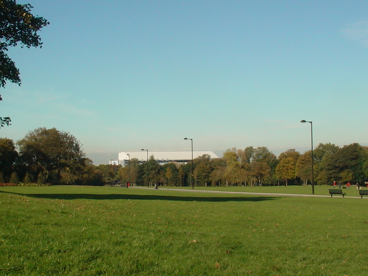 Stanley Park, Liverpool, looking towards Goodison Park stadium.